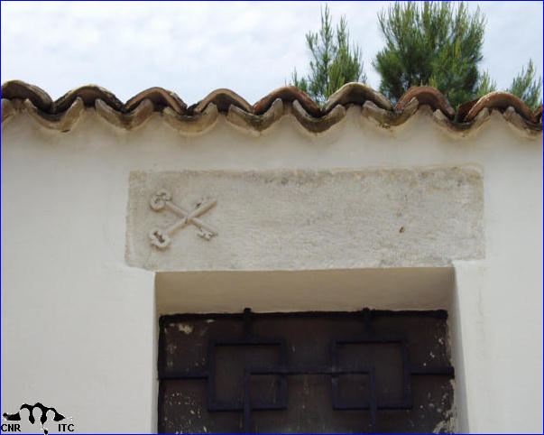 Particolare dell'architrave di spoglòio reimpiegata nella cappella, superfetazione ottocentesca. Chiesa di S. Maria delle Grazie a Cerignola (FG)